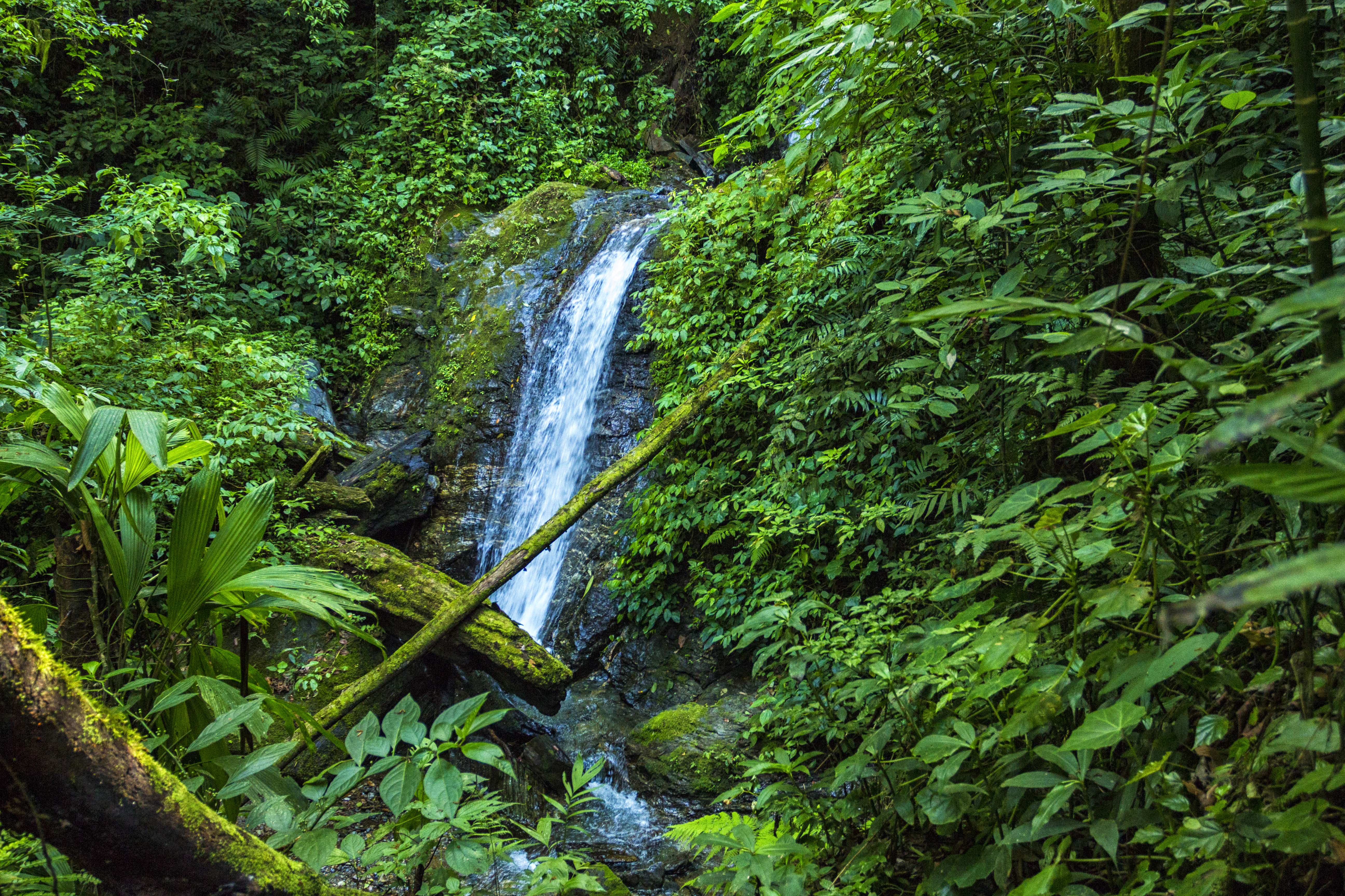 Parque Nacional Montaña de Comayagua, PANACOMA. Honduras.